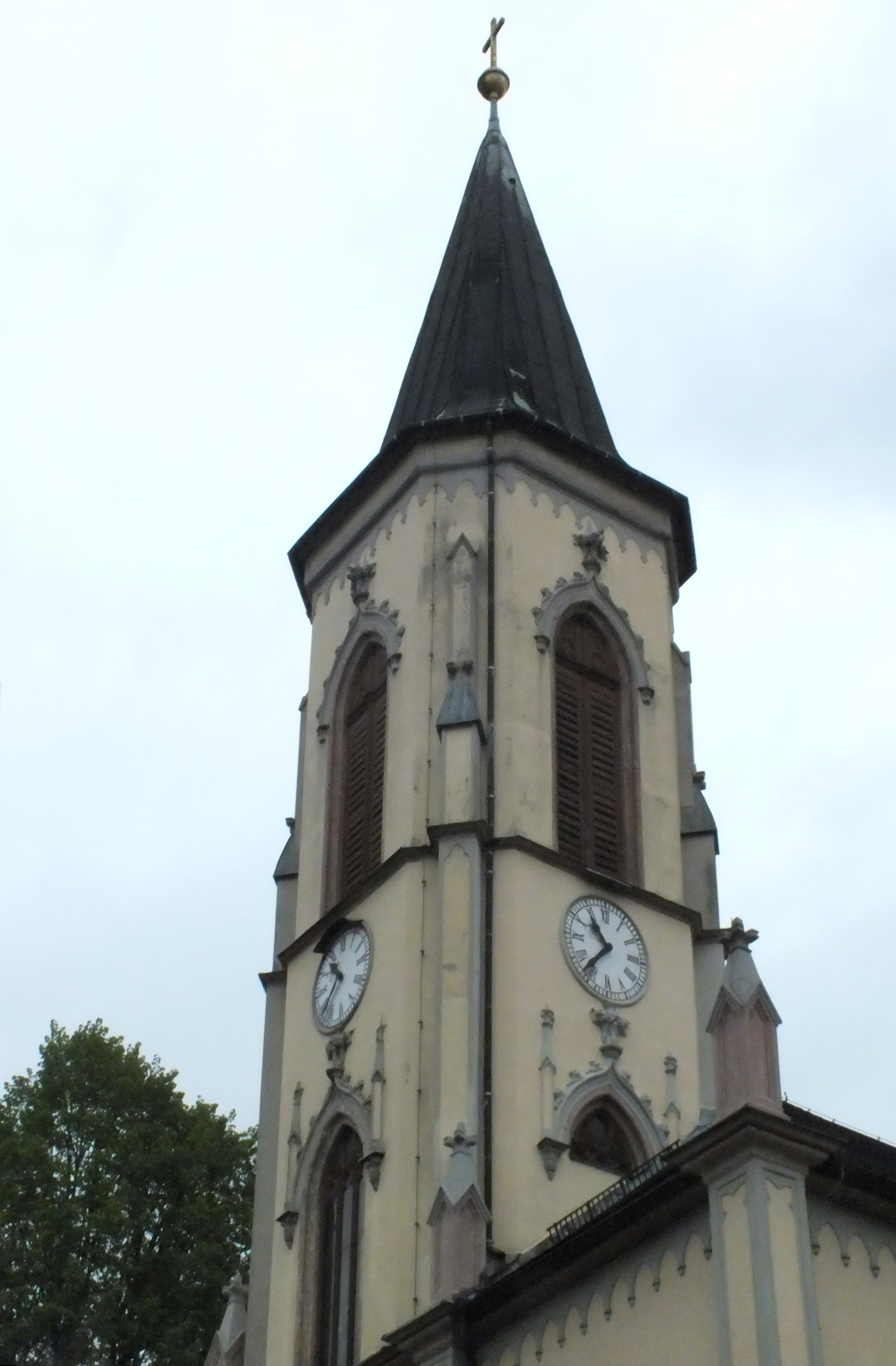 Hospitalkirche St. Georg Lößnitz